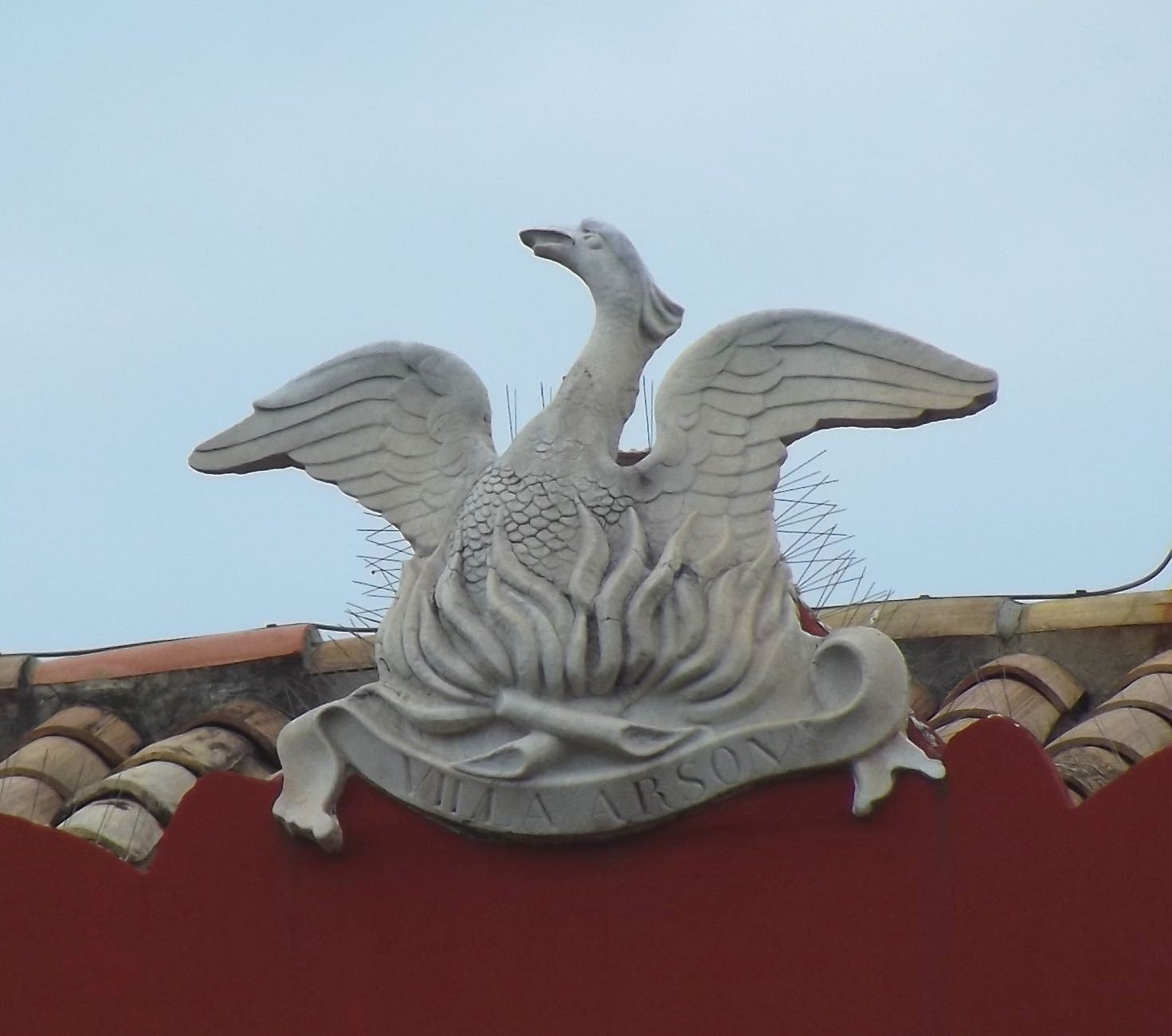 Le phoenix de la Villa Arson